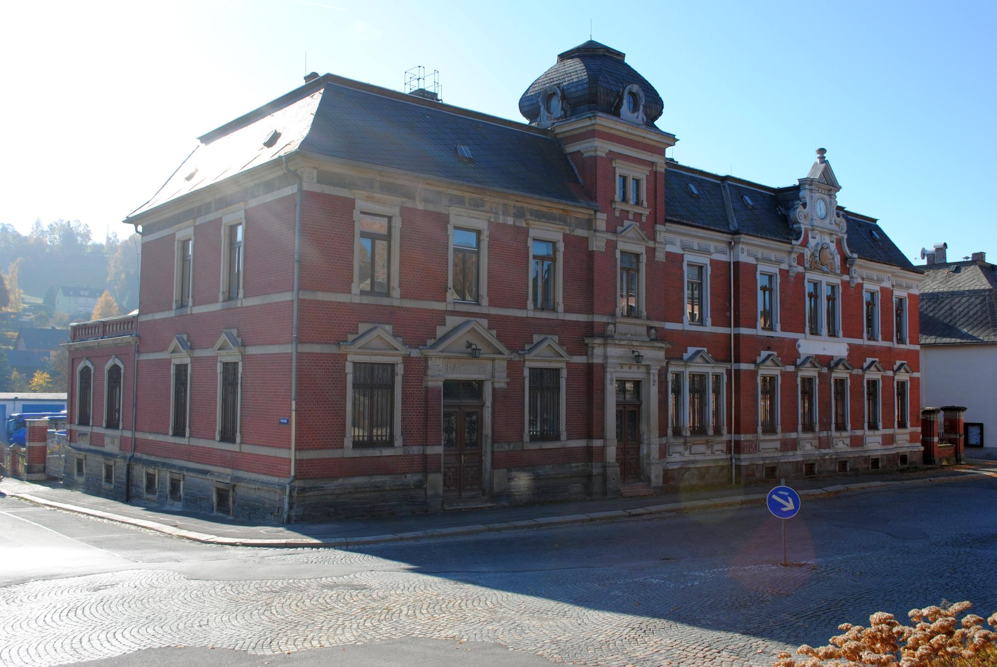 ehemalige Post in Markneukrichen (Vogtland)